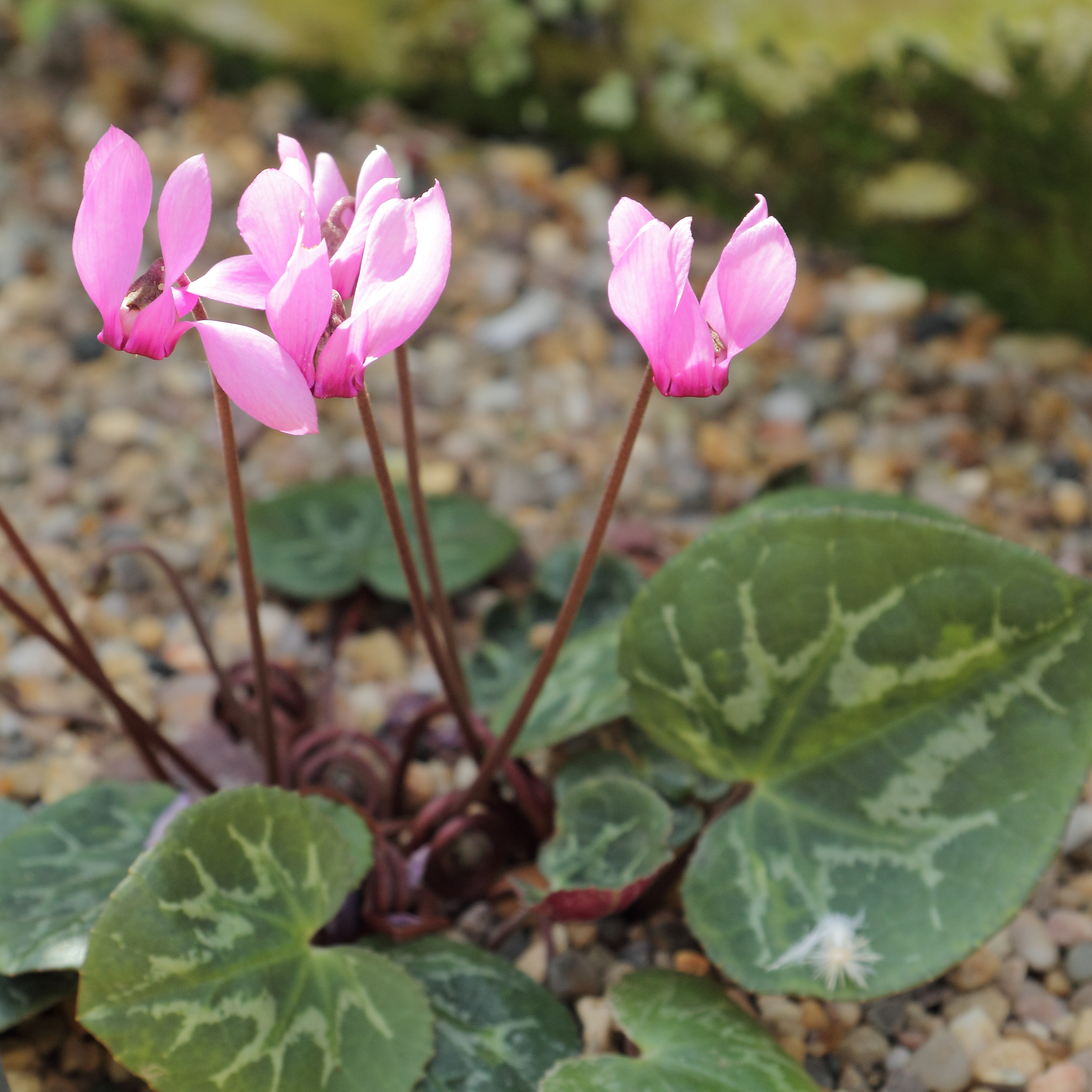 Cyclamen purpurascens, identifierad med hjälp av befintlig skylt vid Kew Gardens, London.